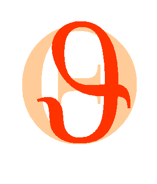 Greek letter